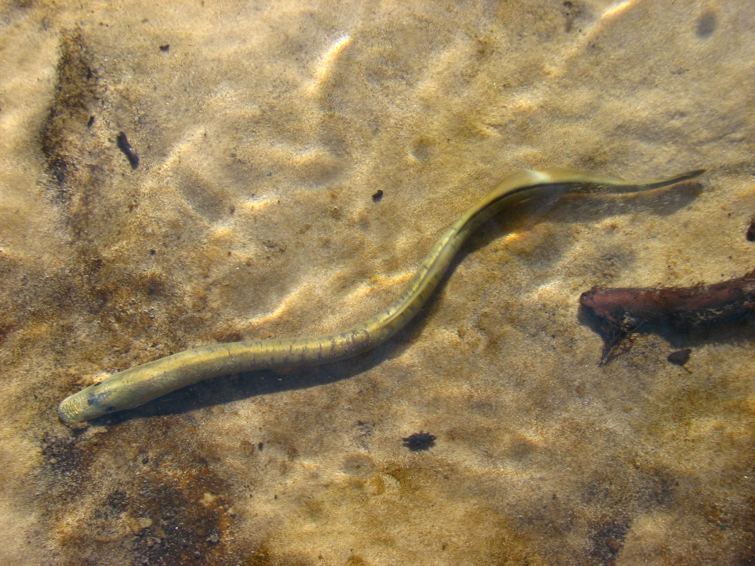 Мінога українська (Eudontomyzon mariae) з національного парку "Святі Гори"